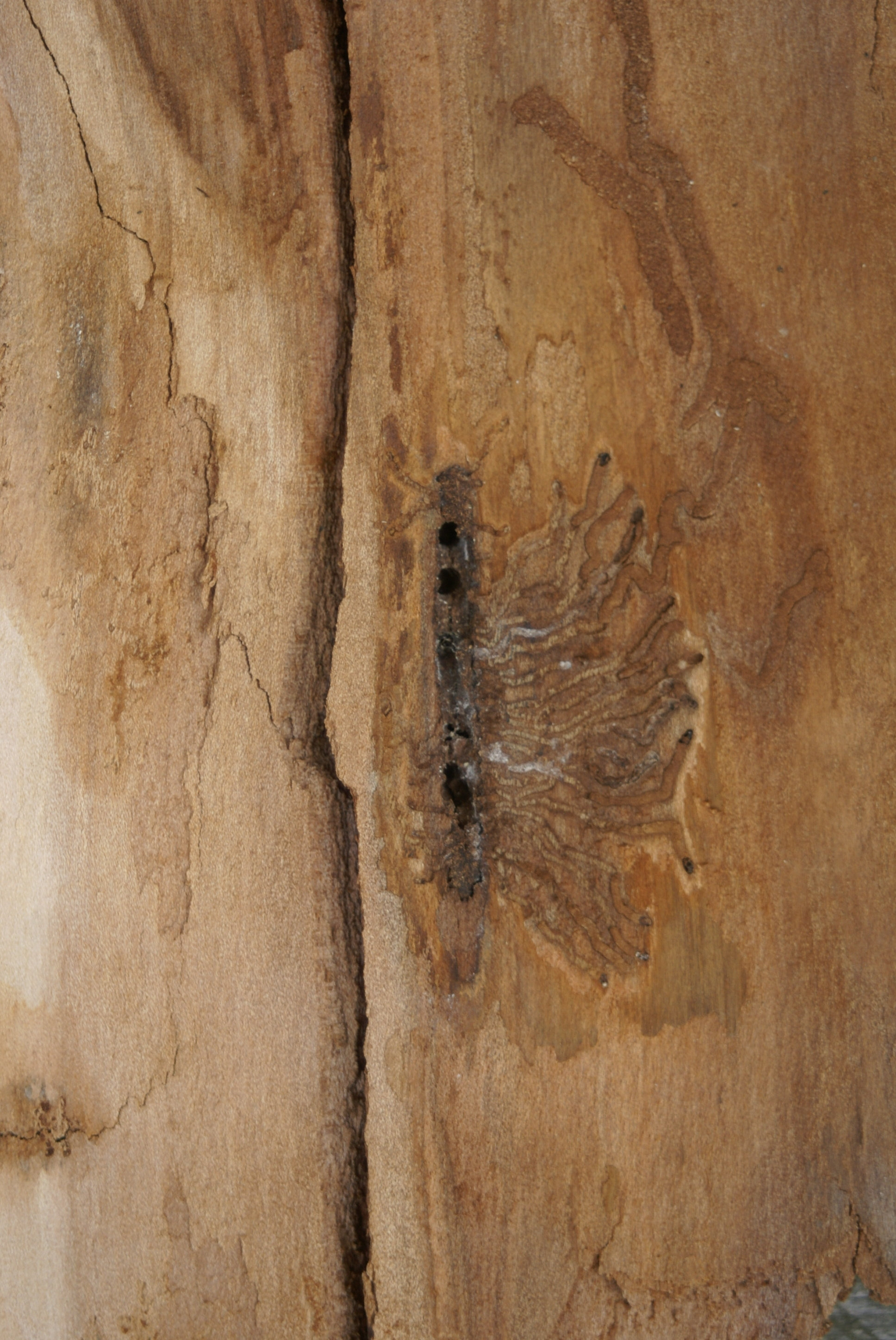 Fraßbild von Scolytus ratzeburgi